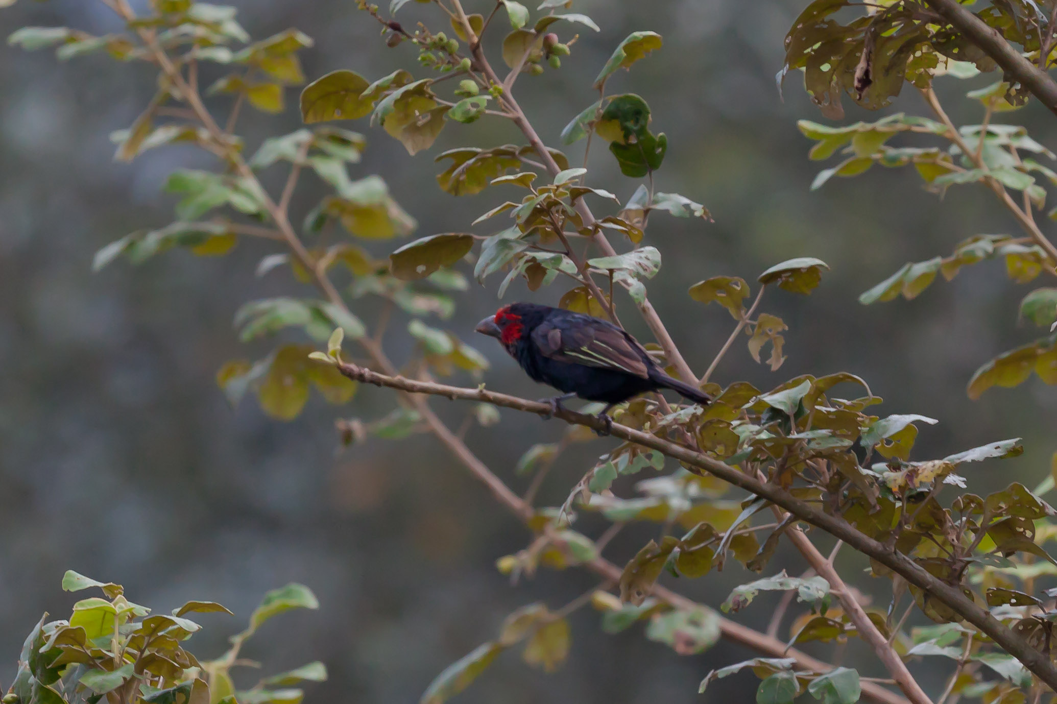 Rotgesicht-Bartvogel - Lake Mburo